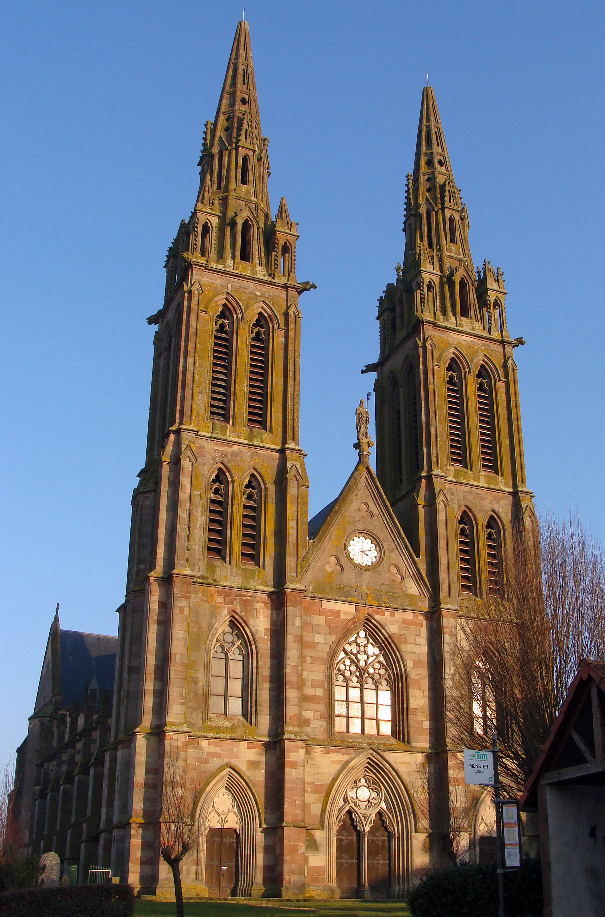 Collégiale Saint-Nicolas de Munster (Moselle) : façade